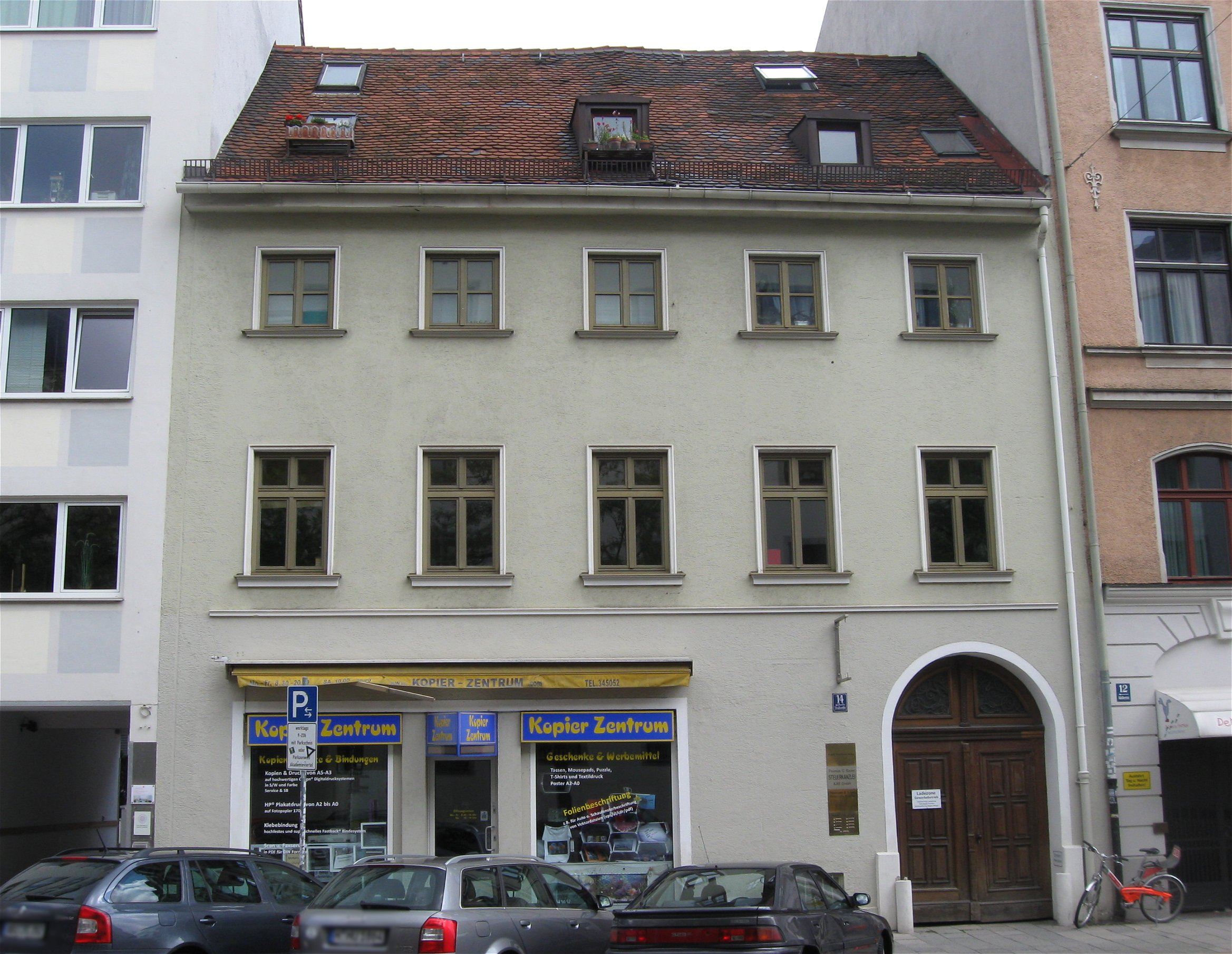 Adalbertstraße 14. Mietshaus, dreigeschossiger Satteldachbau mit vereinfachter klassizistischer Fassade, von Friedrich Schöpke, um 1827/30.